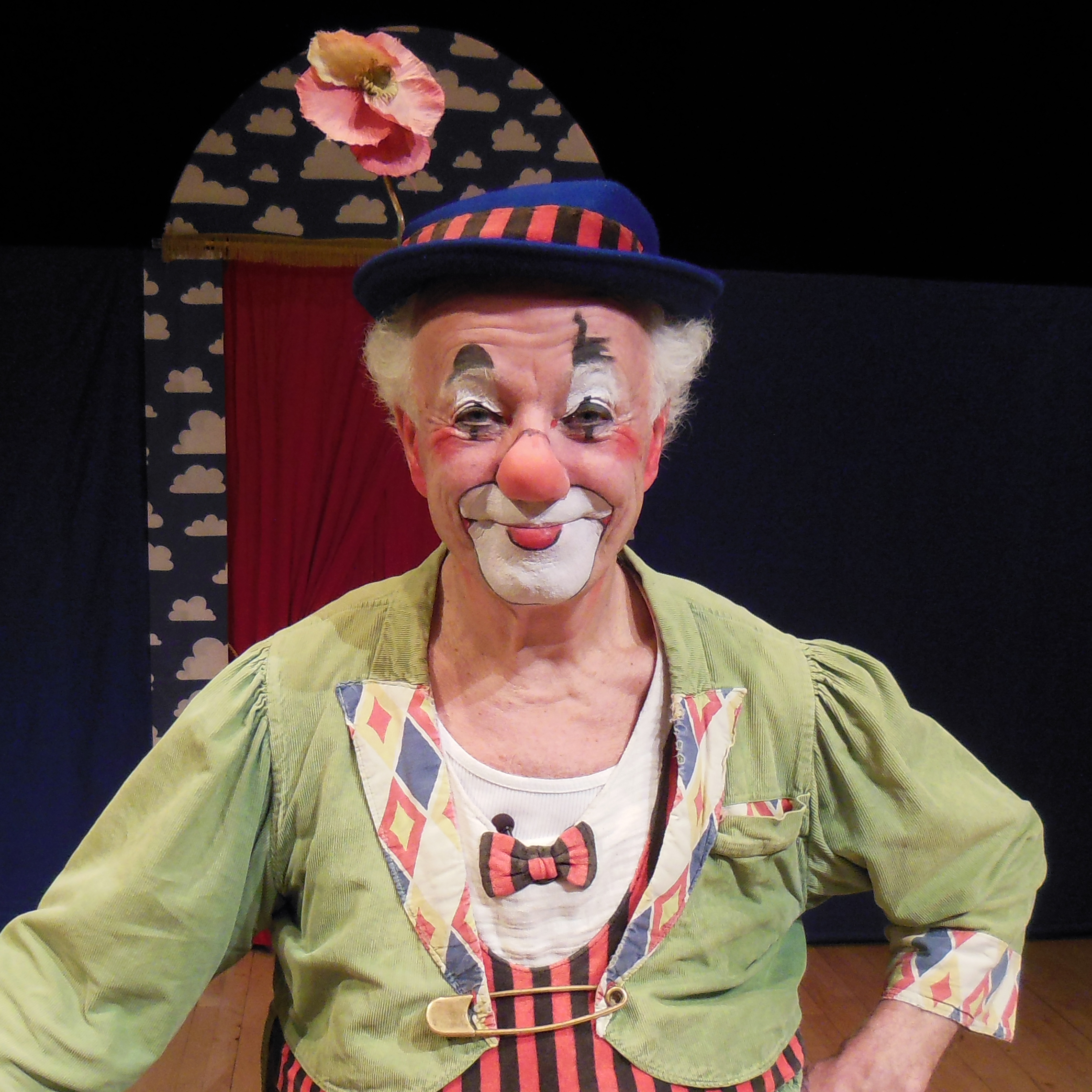 Clownen Manne, efter föreställningen Äntligen här! på Frölunda Kulturhus, 2015.